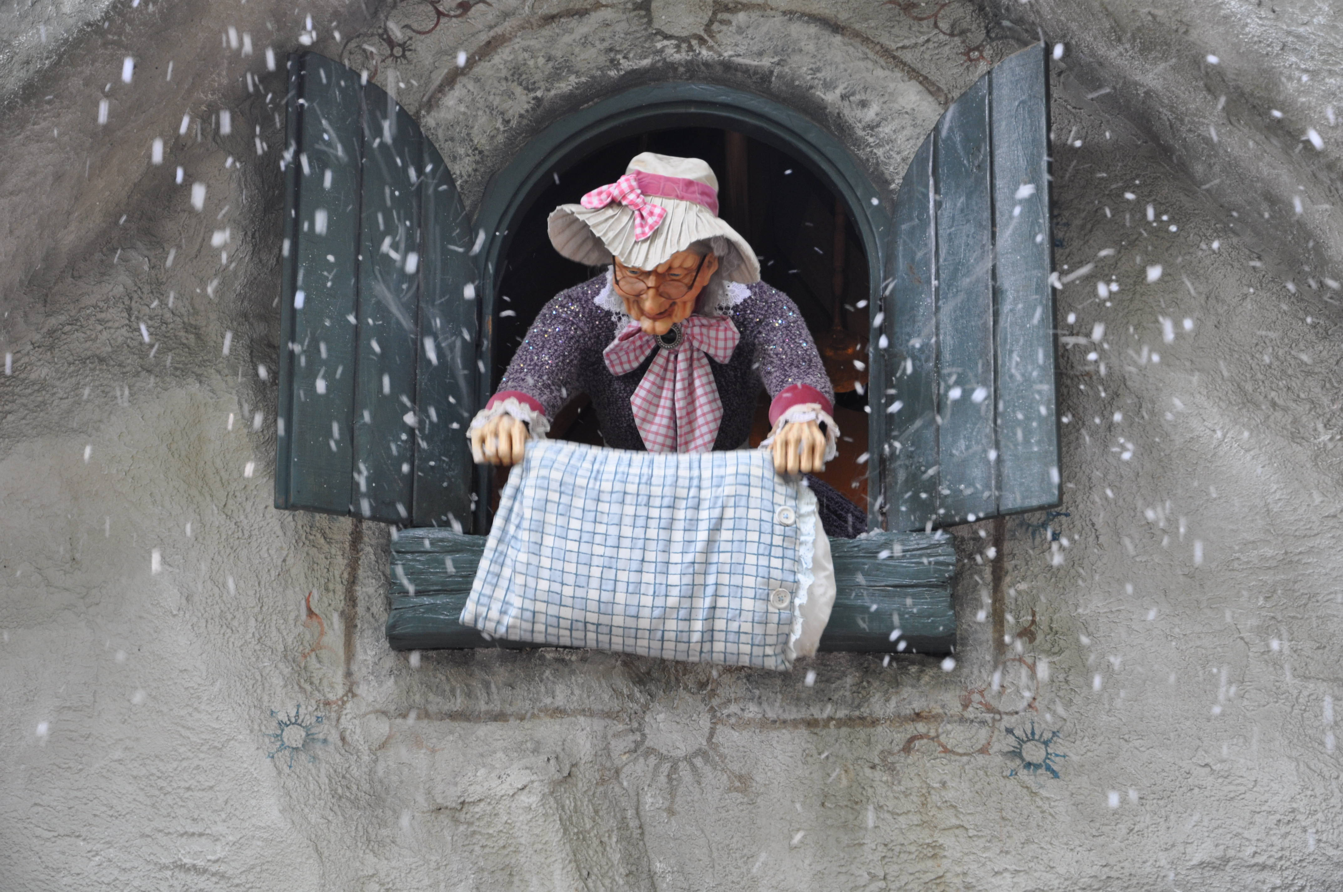 Vrouw Holle in De Efteling in Kaatsheuvel.